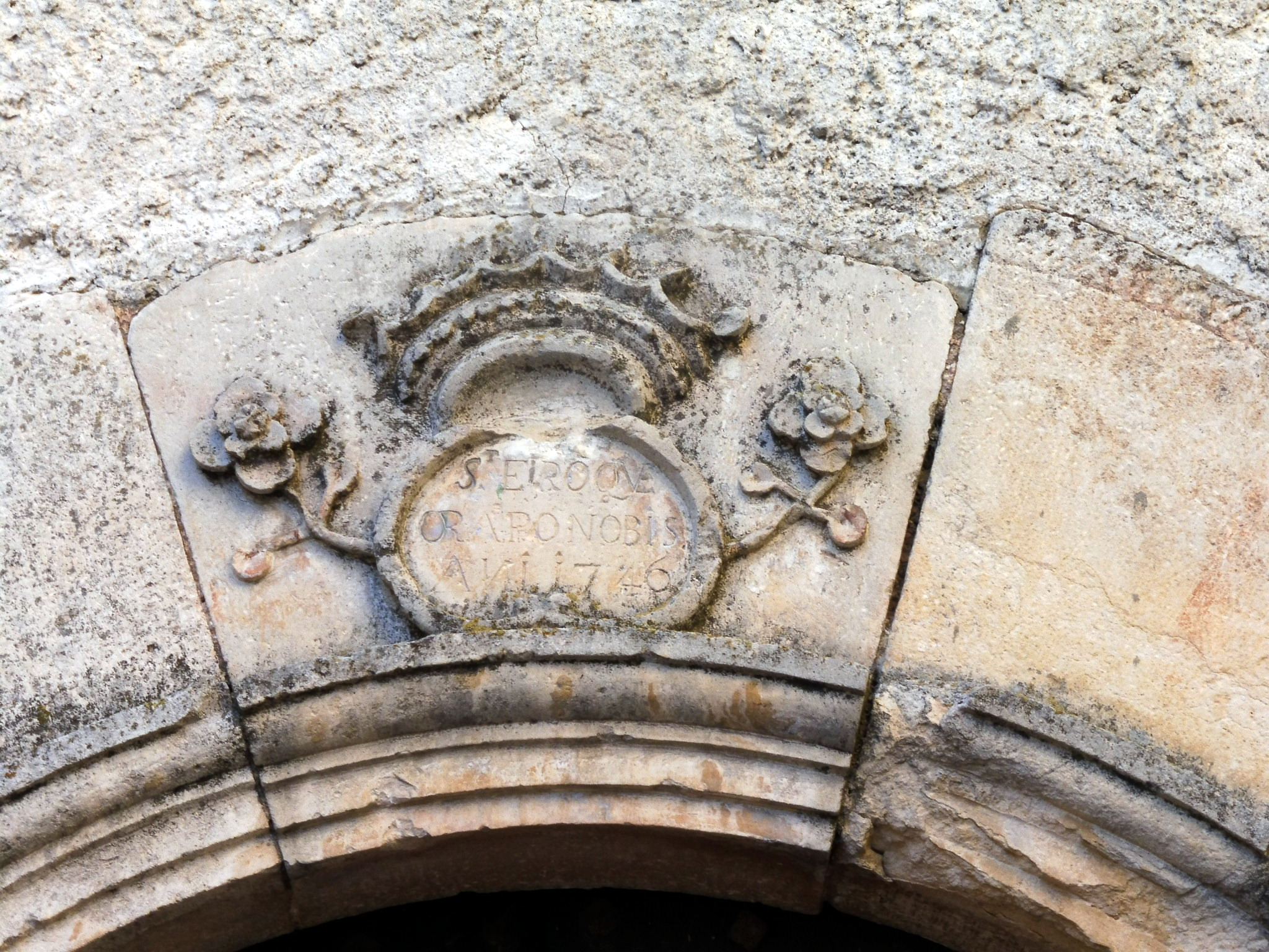 Capella de Sant Roc de les Avellanes (les Avellanes i Santa Linya): baix relleu a la dovella central del portal